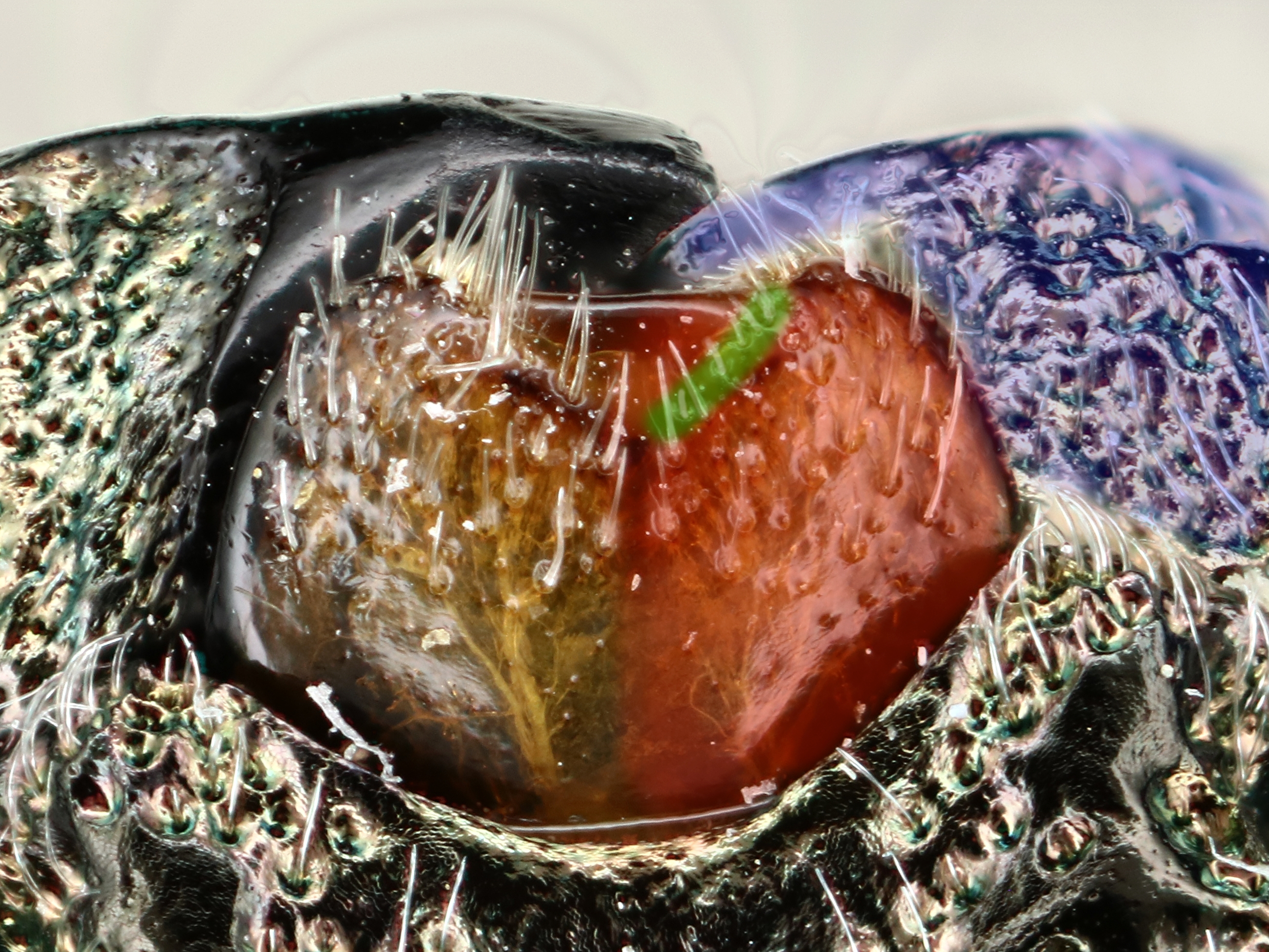 Oberlippe von Chalcophora mariana, rechte Bildhälfte teilweise koloriert. blau: Oberkiefer; rot: Oberlippe; grün: Furche